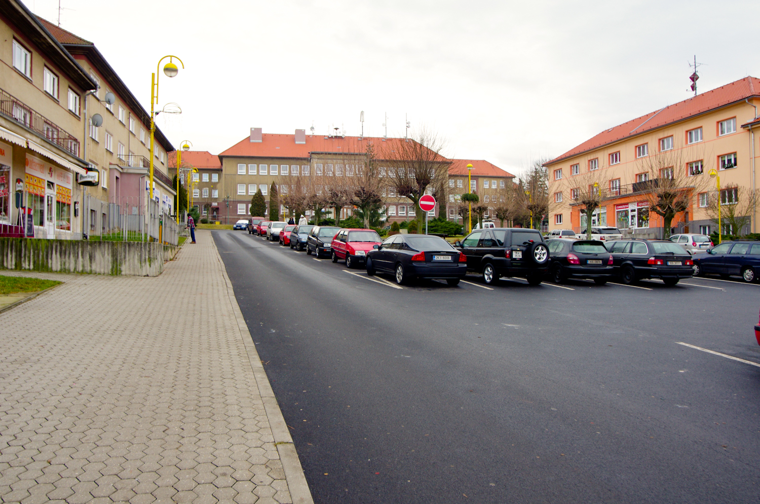 Březová, okres Sokolov, Náměstí Míru